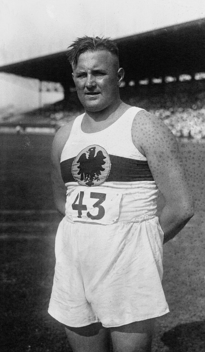 Stade de Colombes (Athlétisme) match France-Allemagne : Uebler (Allemand) : [photographie de presse] / Agence Meurisse